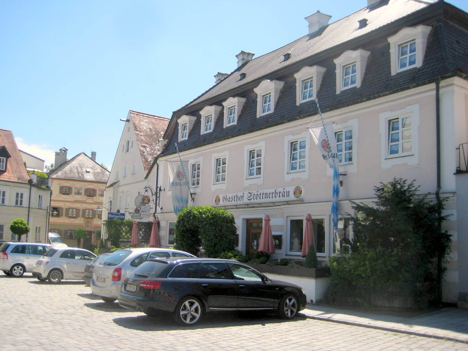 Vohburg an der Donau ist eine Gemeinde im Landkreis Pfaffenhofen a.d. Ilm.